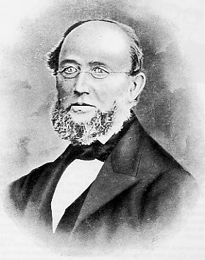 El relojero Georges Frederic Roskopf.